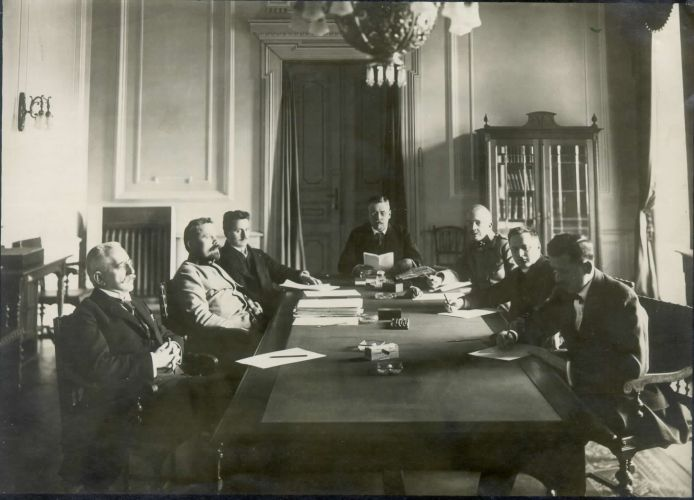 Zadnji Kranjski deželni odbor leta 1917. Od leve proti desni sedijo: dr. Thriller, dr. Zajc, dr. Pegan, dr. Šušteršič, grof Barbo, dr. Lampe in zapisnikar.